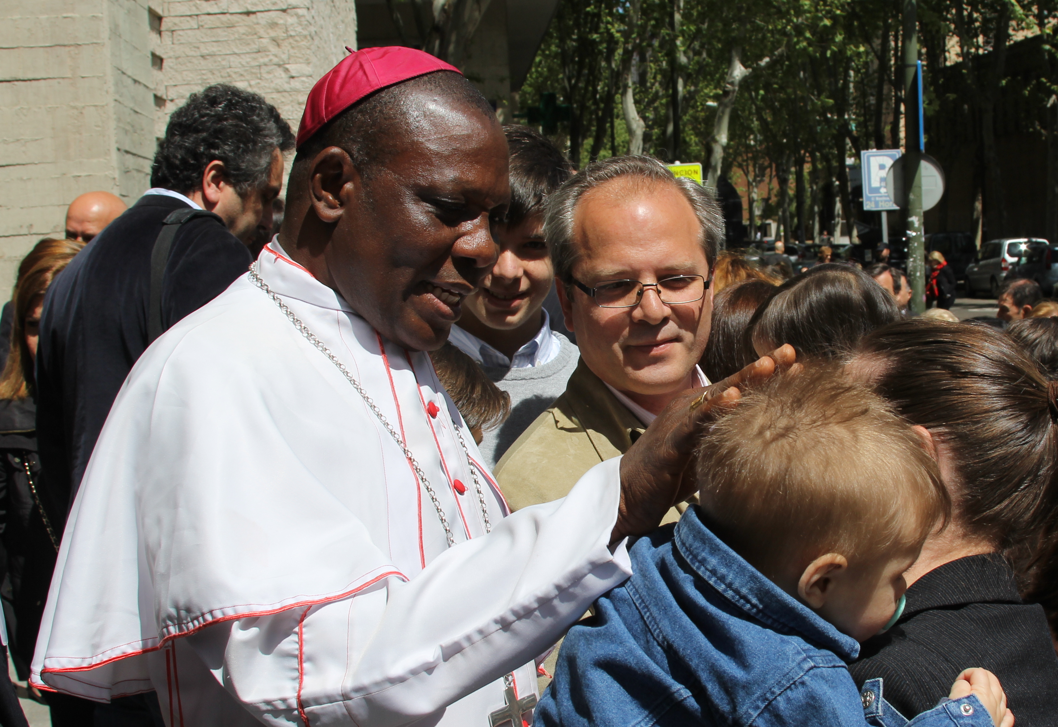 Mgr Oliver Dashne Doeme.